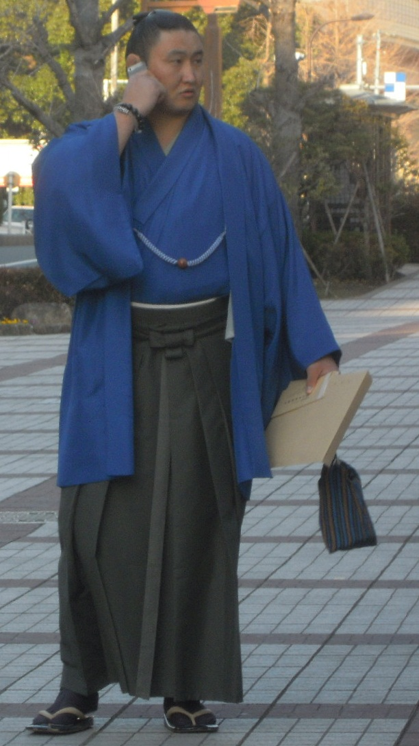 力士会を終えて両国国技館を出る東龍関